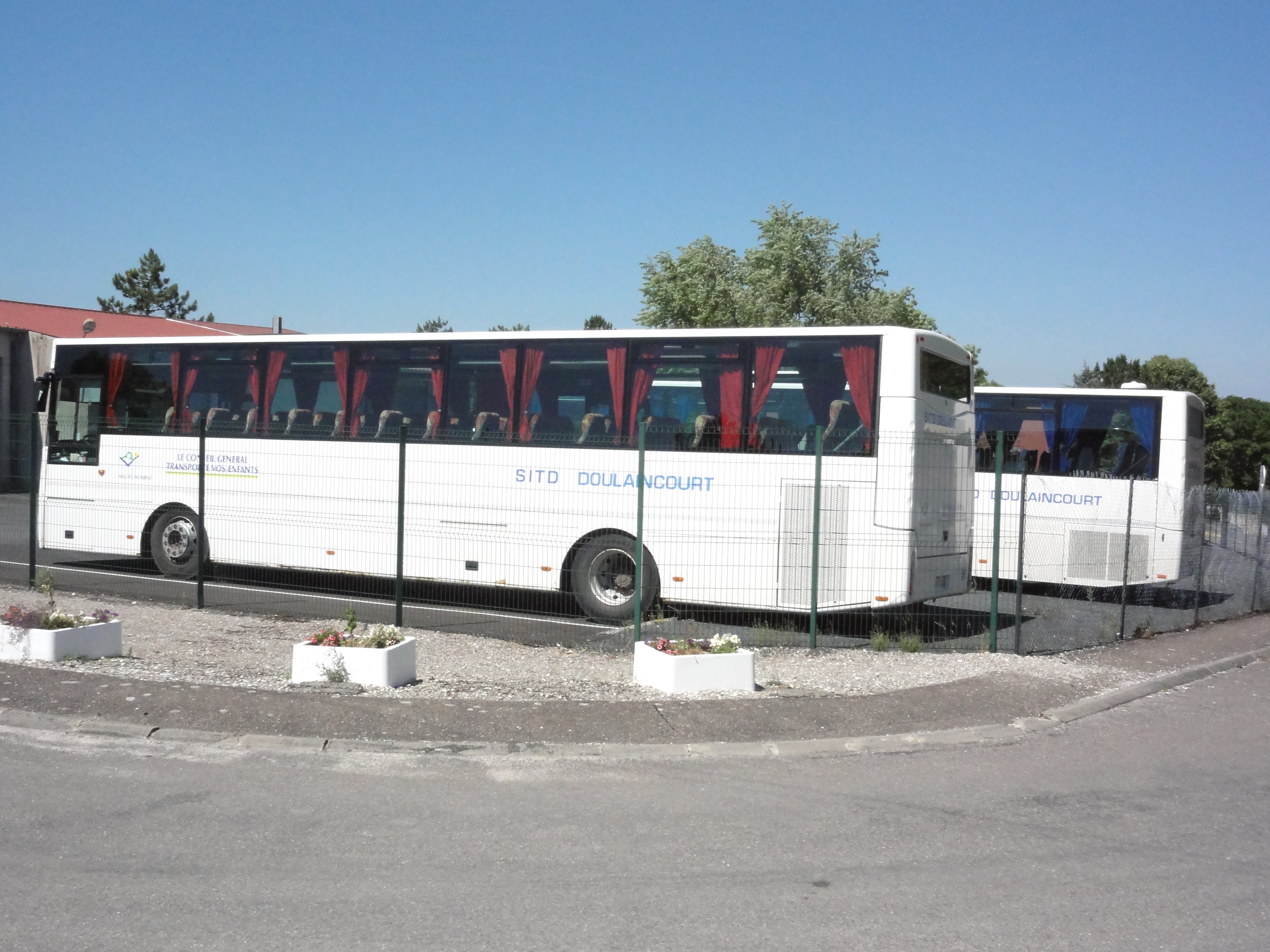 Doulaincourt, cars scolaires SITD Doulaincourt